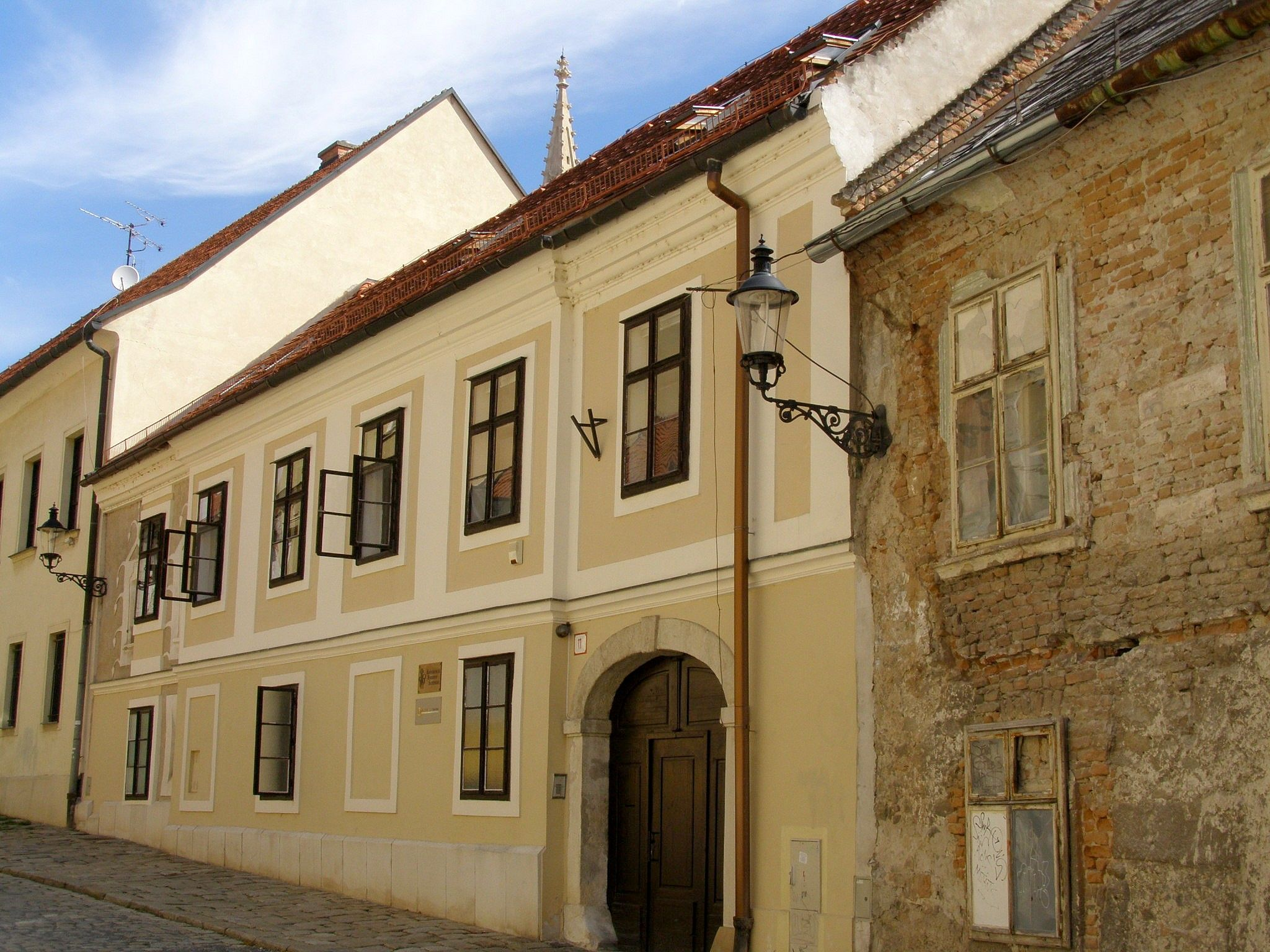 Kapitulská č. 11. Sídlo tu má Konferencia biskupov Slovenska. Niekoľko rokov pred svojou smrťou (1972) tu so svojou manželkou býval známy bratislavský archivár Ovidius Faust (1896 - 1972)